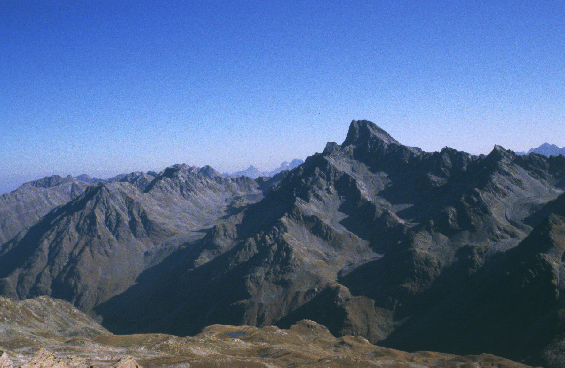 Glockturm von Südwesten, von der Nauderer Hennesiglspitze